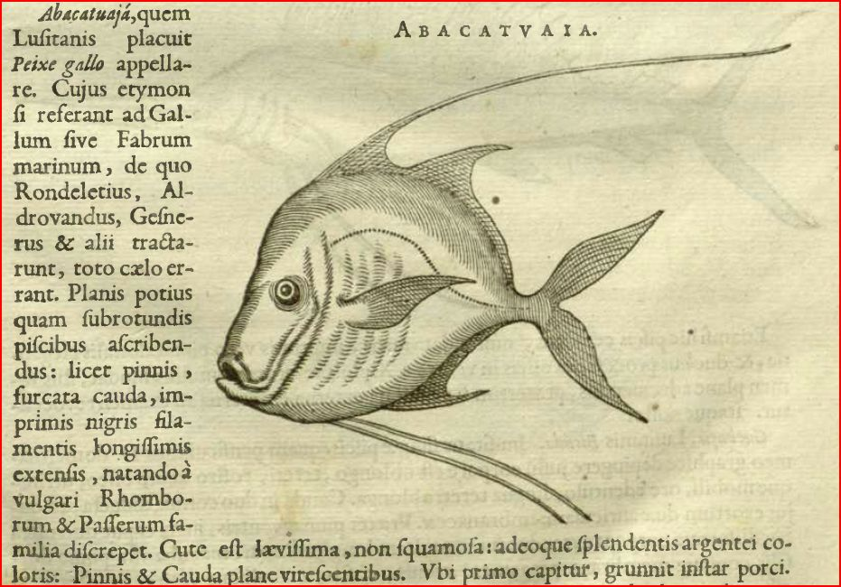 страница из книги «Естественная история Бразилии», 1648 г с изображением рыбы ABACATVAIA. Авторы книги немецкий натуралист Георг Маркграф (Georg Markgraf,1610-1644) и голандский врач Виллем Пизон (Willem Piso,1611-1678) побывавшие в голандской Бразилии 1637—1644 годах.